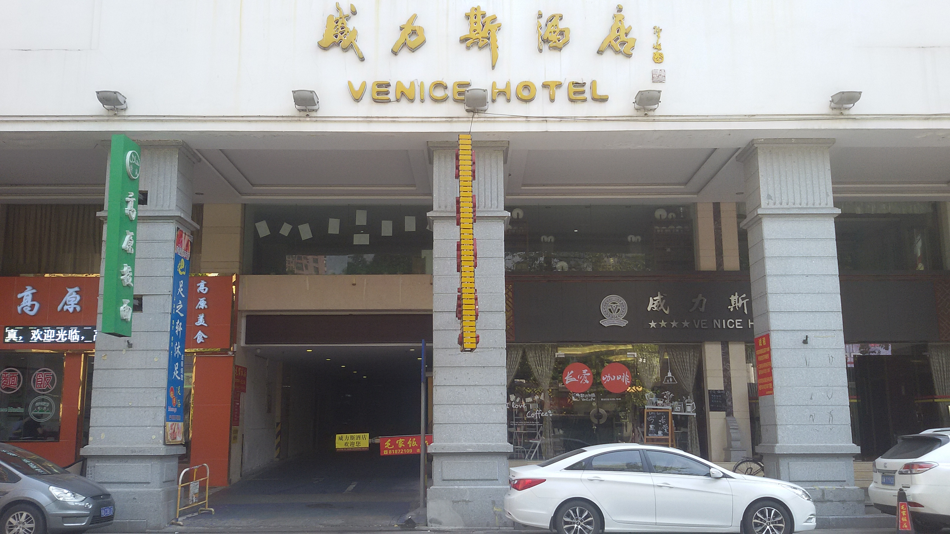 粵語: 威力斯酒店